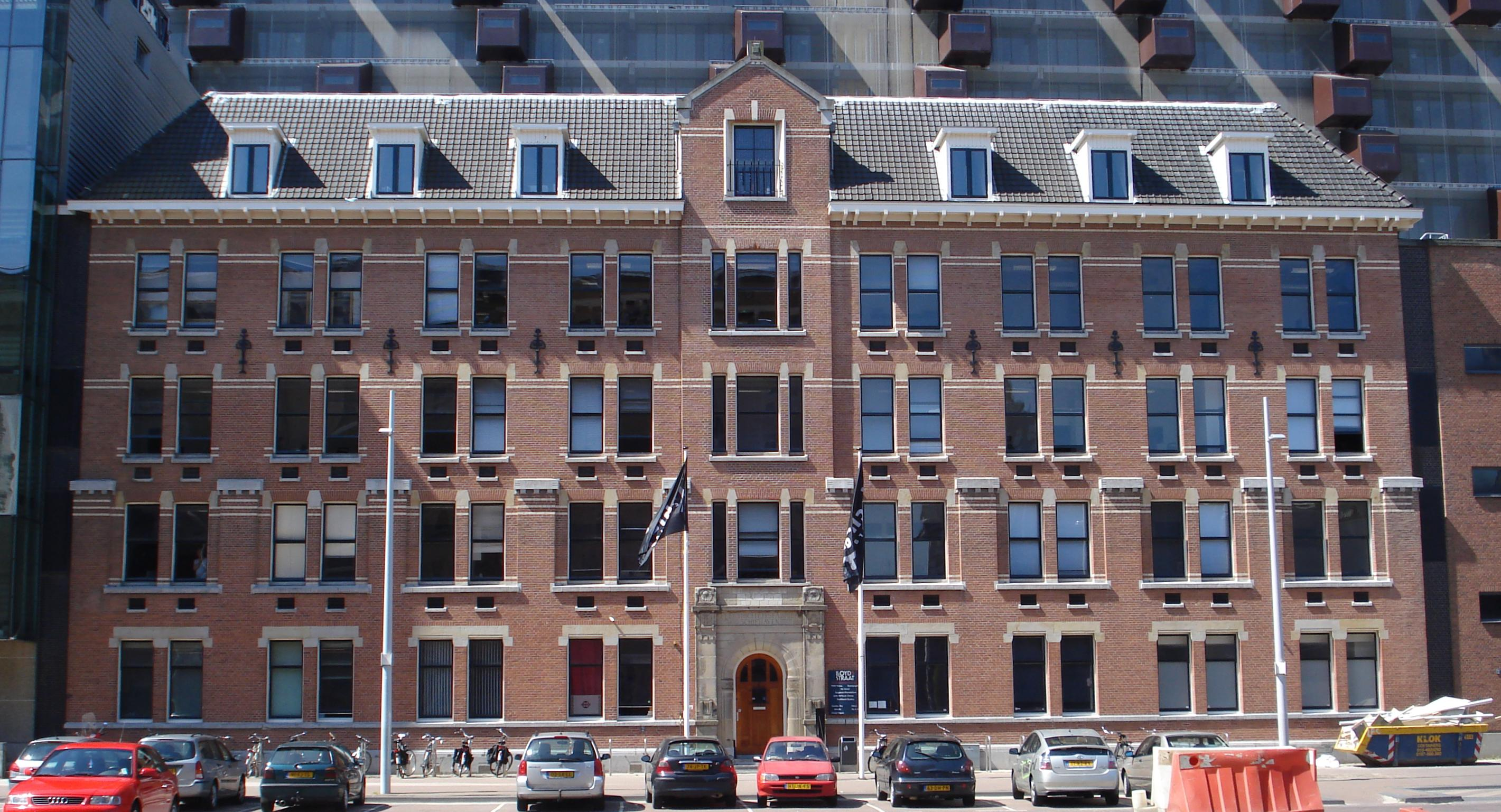 Rotterdam, Lloydstraat 5. Rijksmonument.